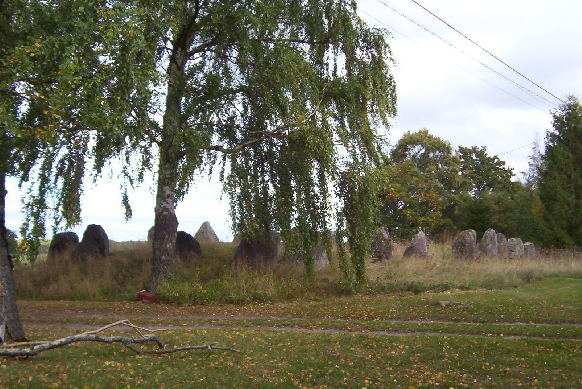 Bröt-Anunds grav i Åraslöv